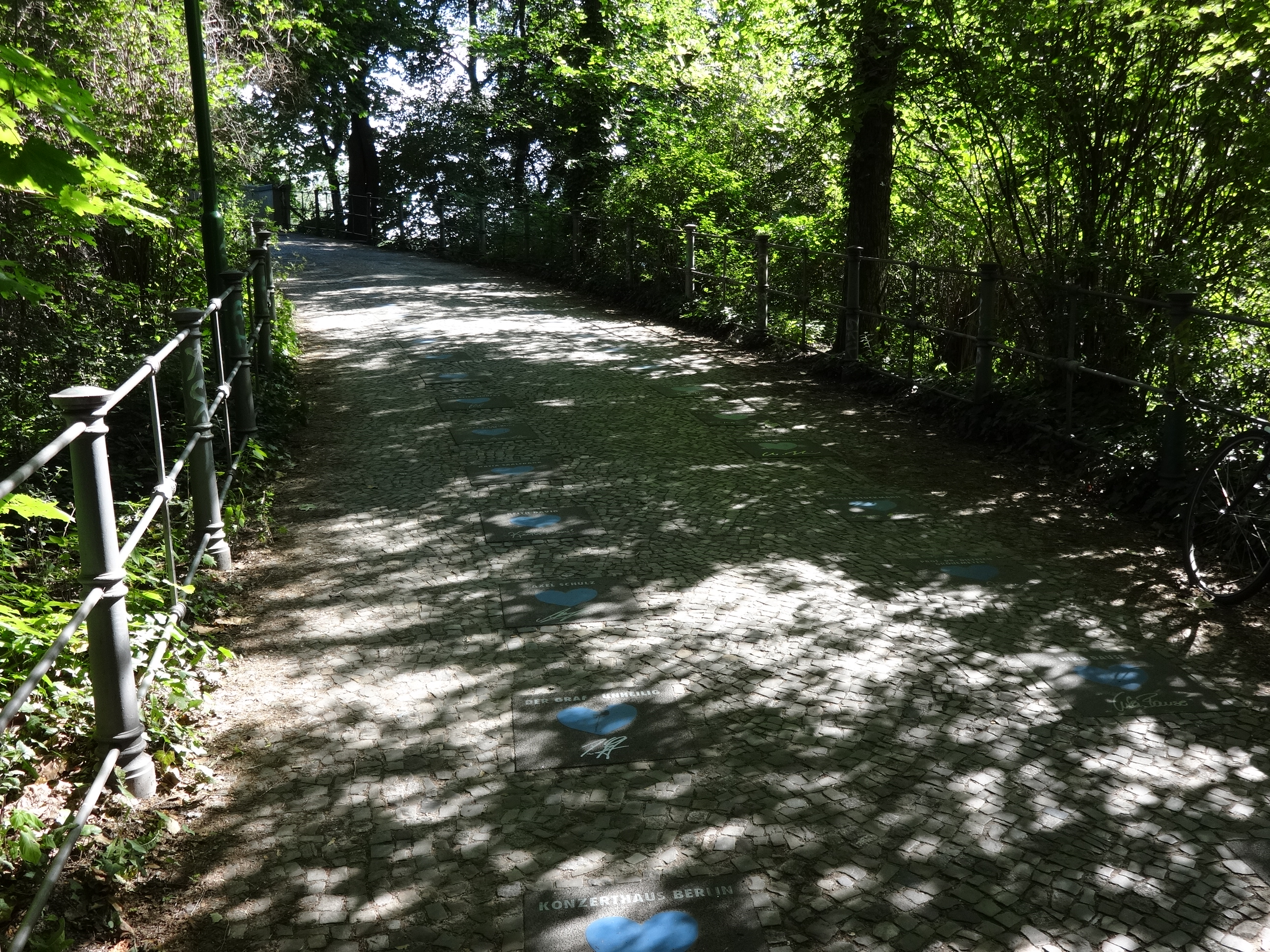 Die herzförmig gestalteten Fliesen ehren Personen und Orgaisationen, die sich um das Wohl von Kindern und Jugendlichen verdient gemacht haben. Sie befinden sich auf dem Aufgang zur Abteibrücke in Berlin-Alt-Treptow.